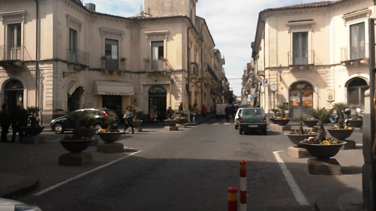 Piazza della Repubblica - Misterbianco